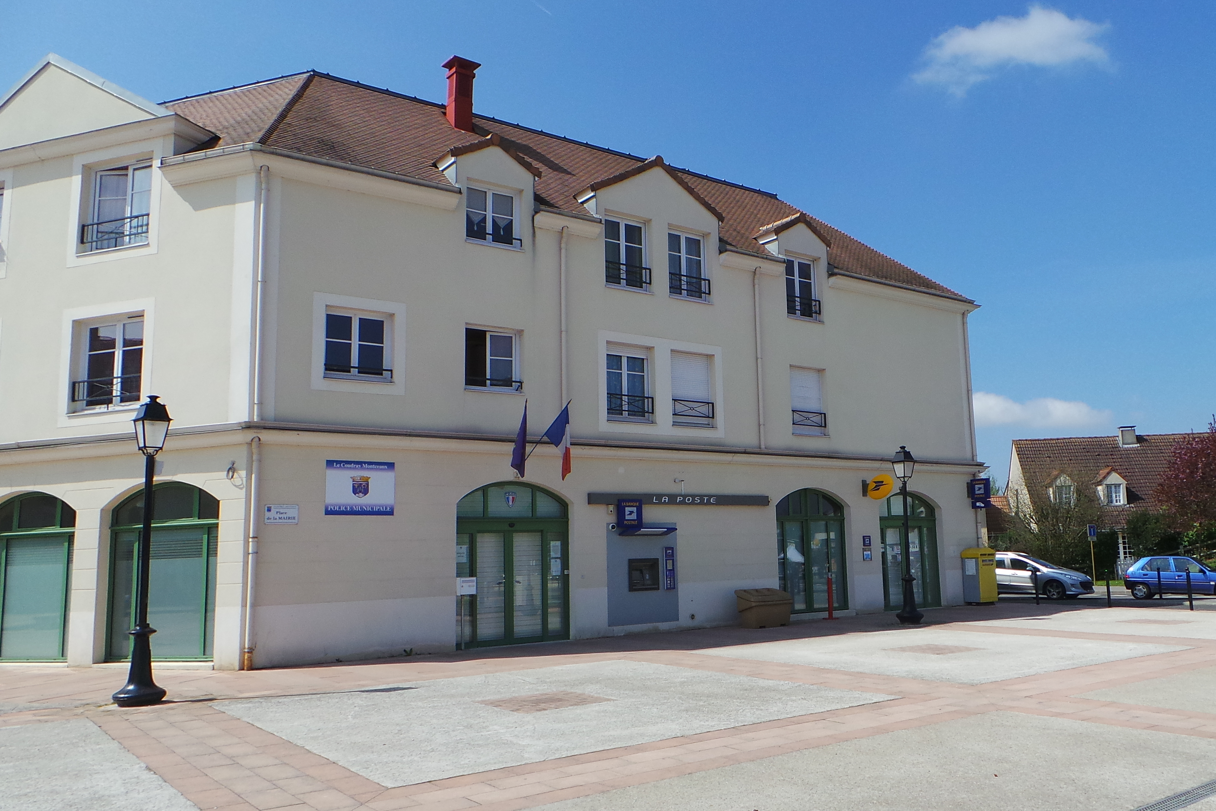 Agence postale du Coudray-Montceaux, Essonne, France